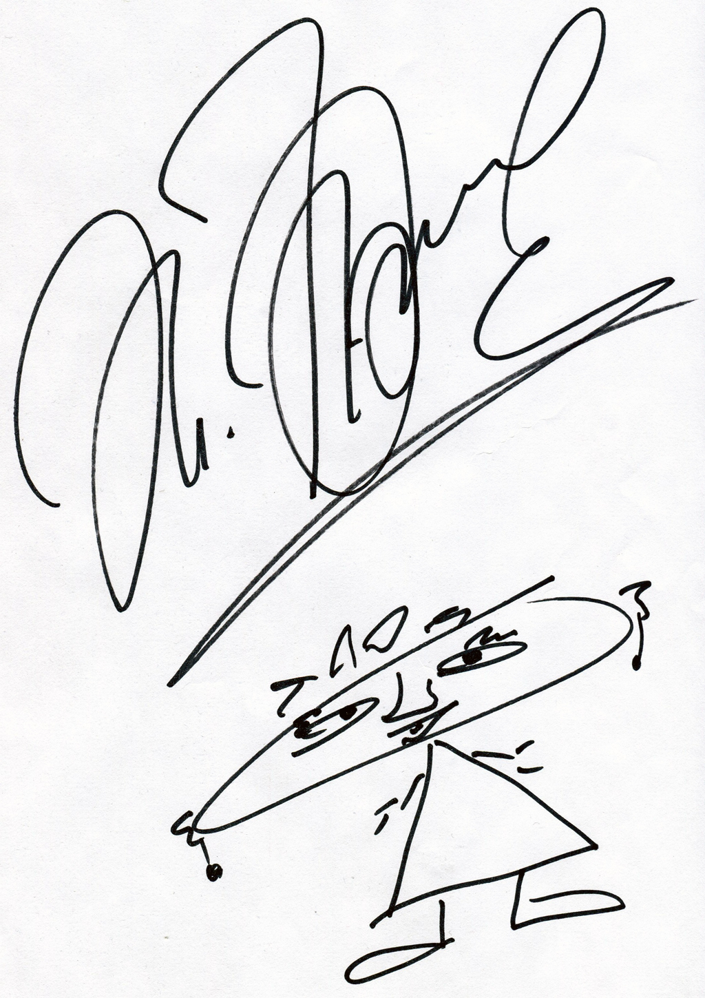 Этот файл, был любезно передан Анисой Ашику (директором по связям с общественностью Жанны Фриске. +7 (926) 896-81-20